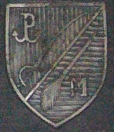 Odznaka batalionu AK "Miotła" (pochodzi z tablicy pamiatkowej umieszczonej w kościele św. Jacka w Warszawie)